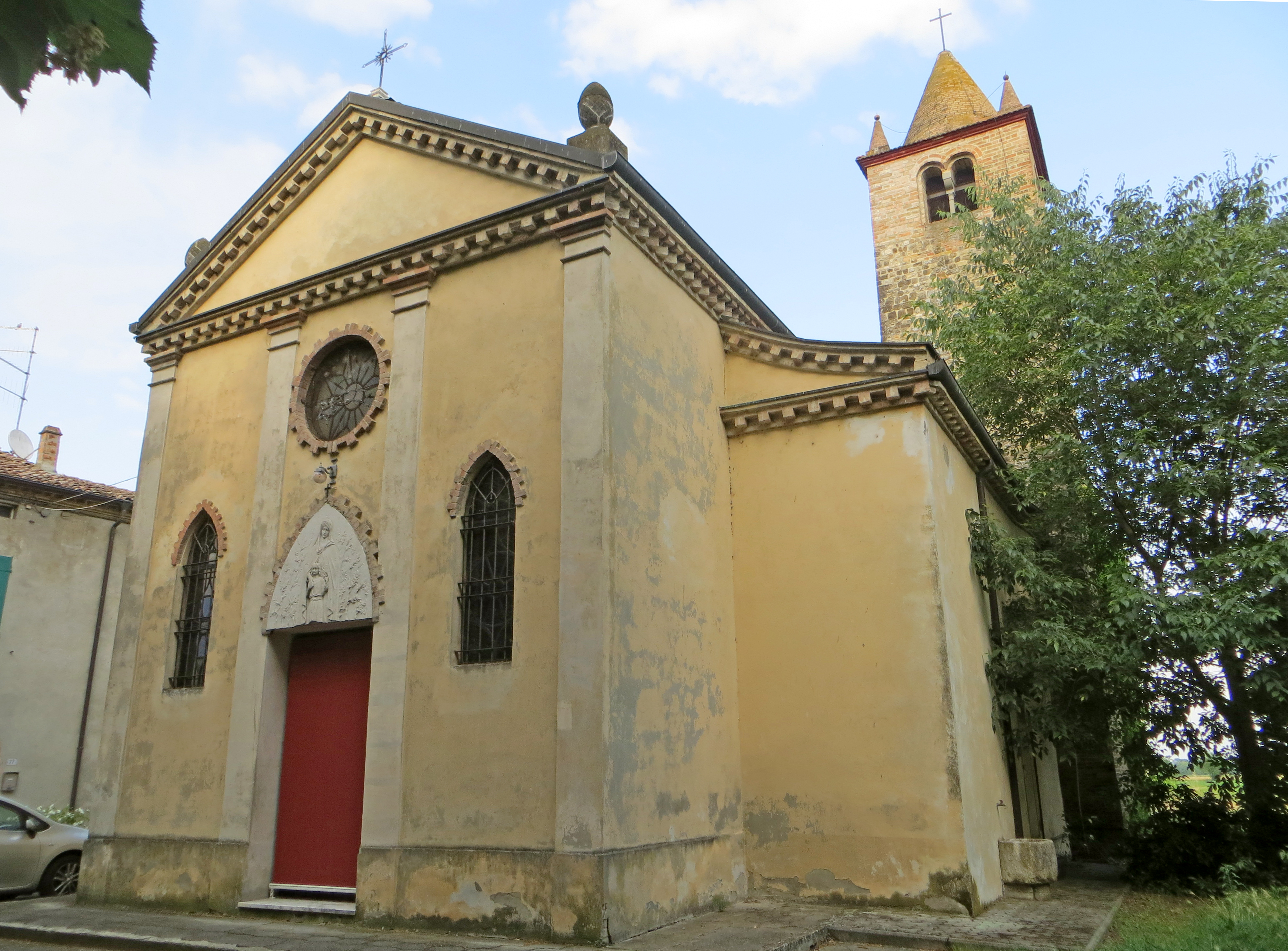 Chiesa di San Donato (San Donato, Parma) - facciata e lato sud